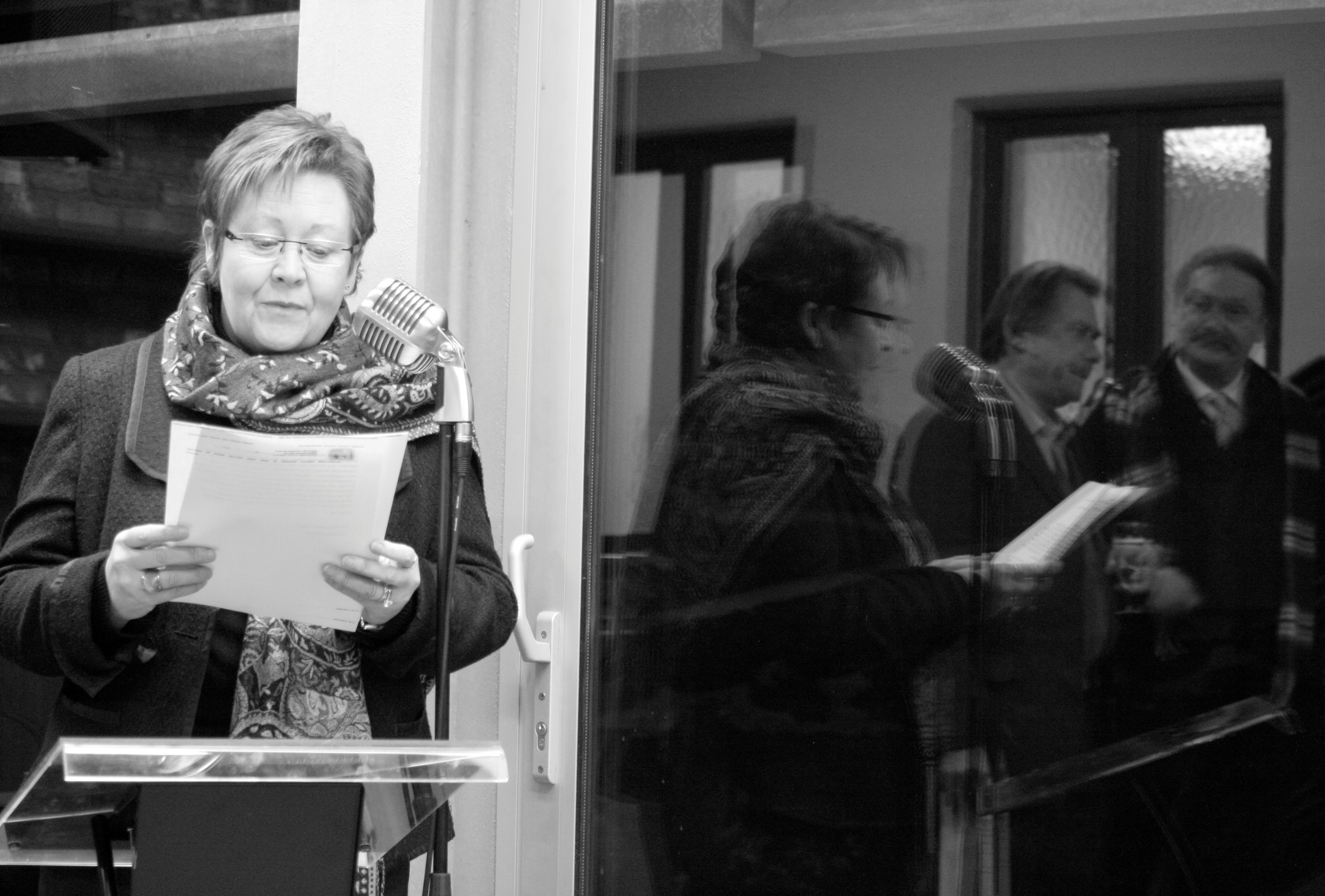 Ria Pattyn, sfeerbeeld